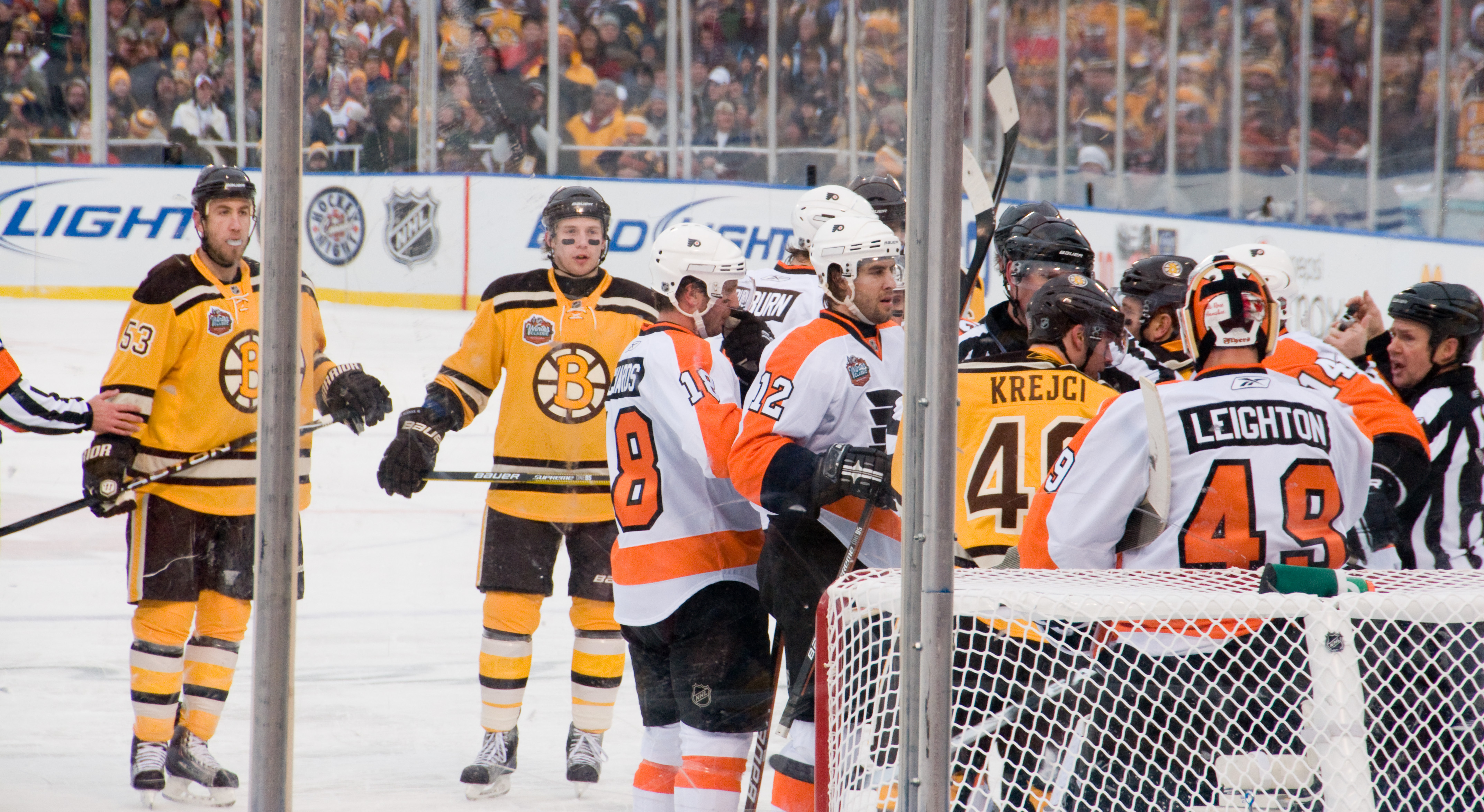 Scrum in Front